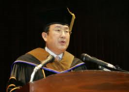 Myongji University President Yoo